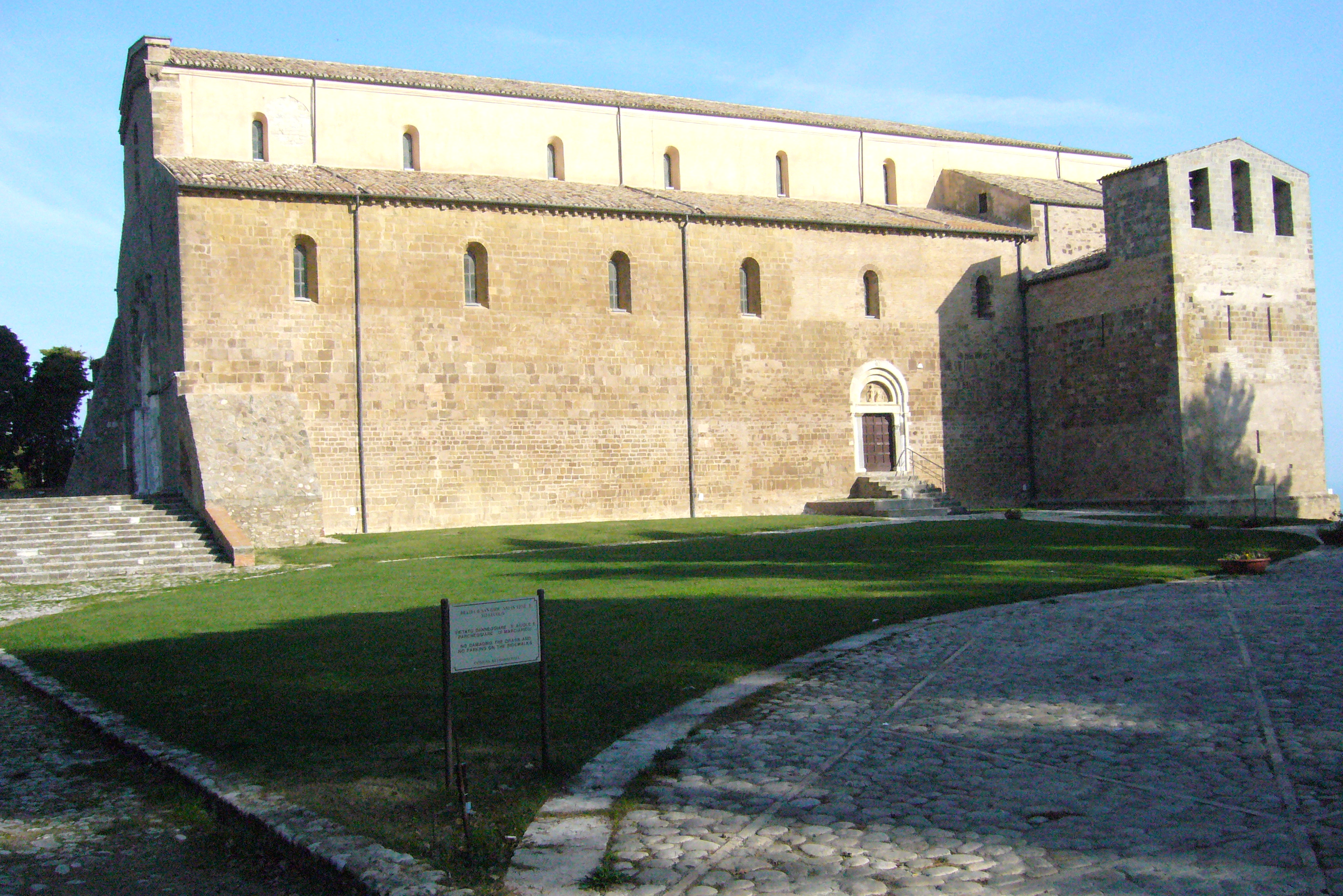 Abbazia di San Giovanni in Venere